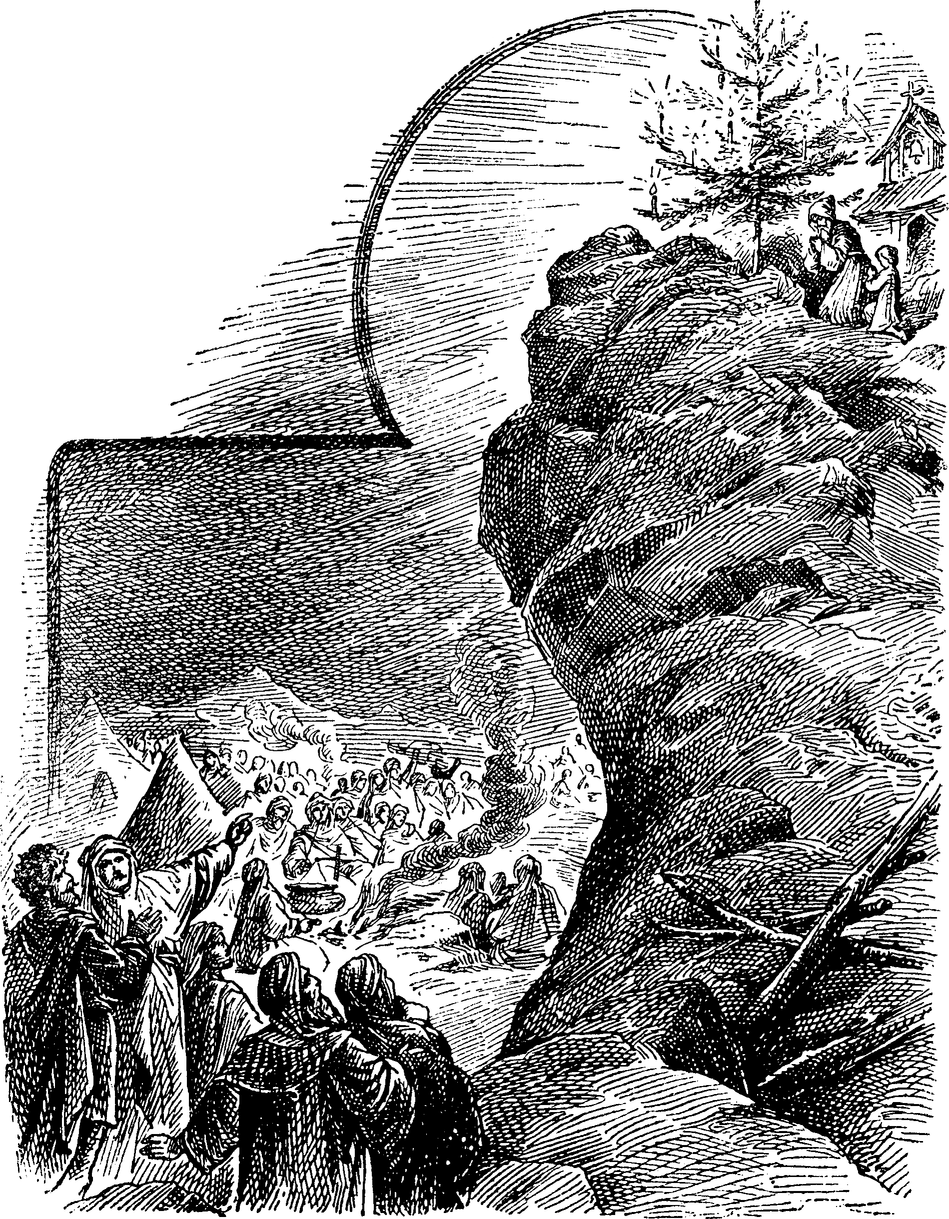 Nûr es Semâ